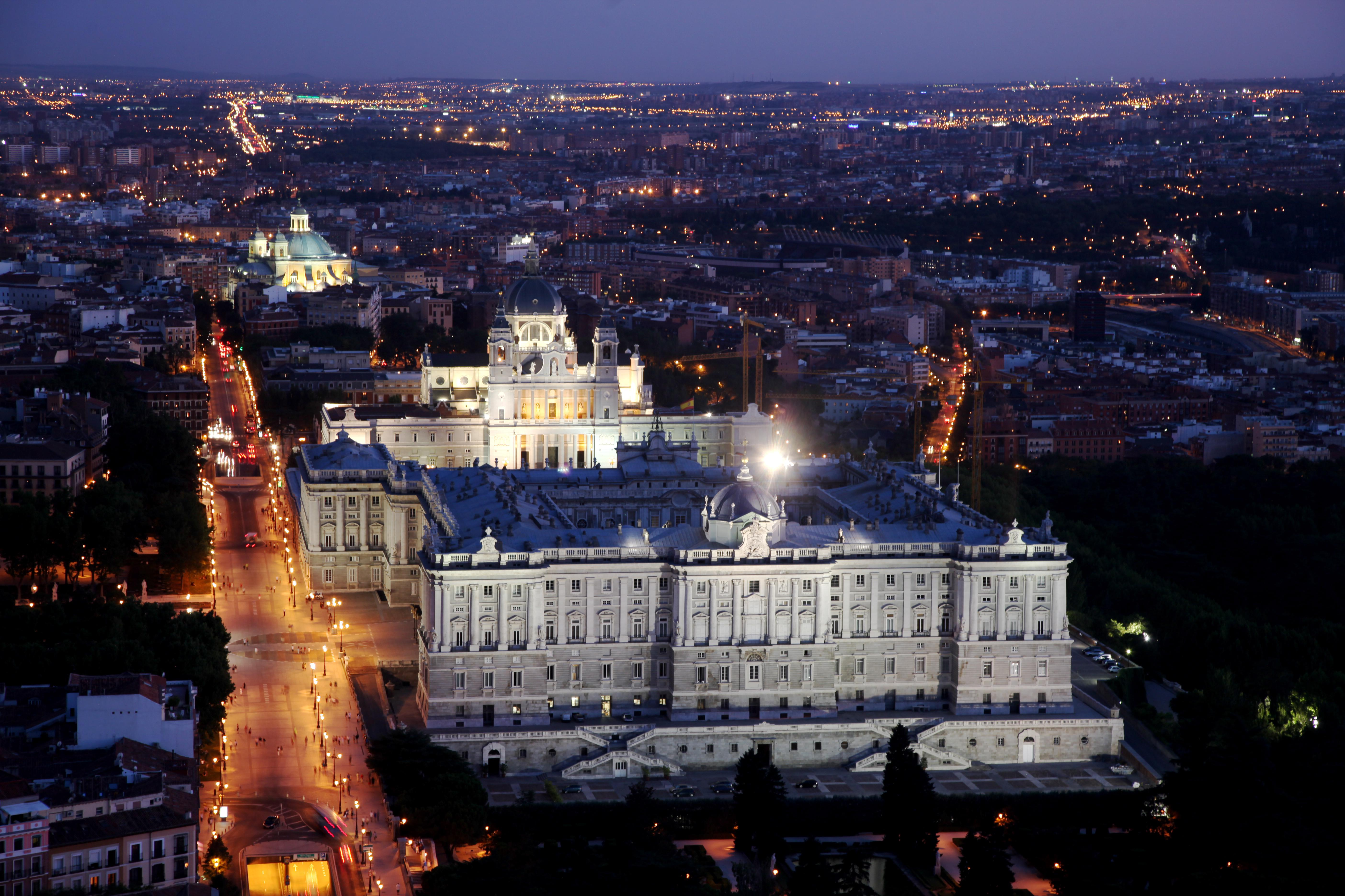 Con la presentación en Nueva Delhi de la próxima edición de los premios de la Academia de Cinematografía India (IIFA), popularmente conocidos como los Óscar de Bollywood, que este año acoge Madrid, nuestra ciudad da un paso más en su imparable proceso de internacionalización.